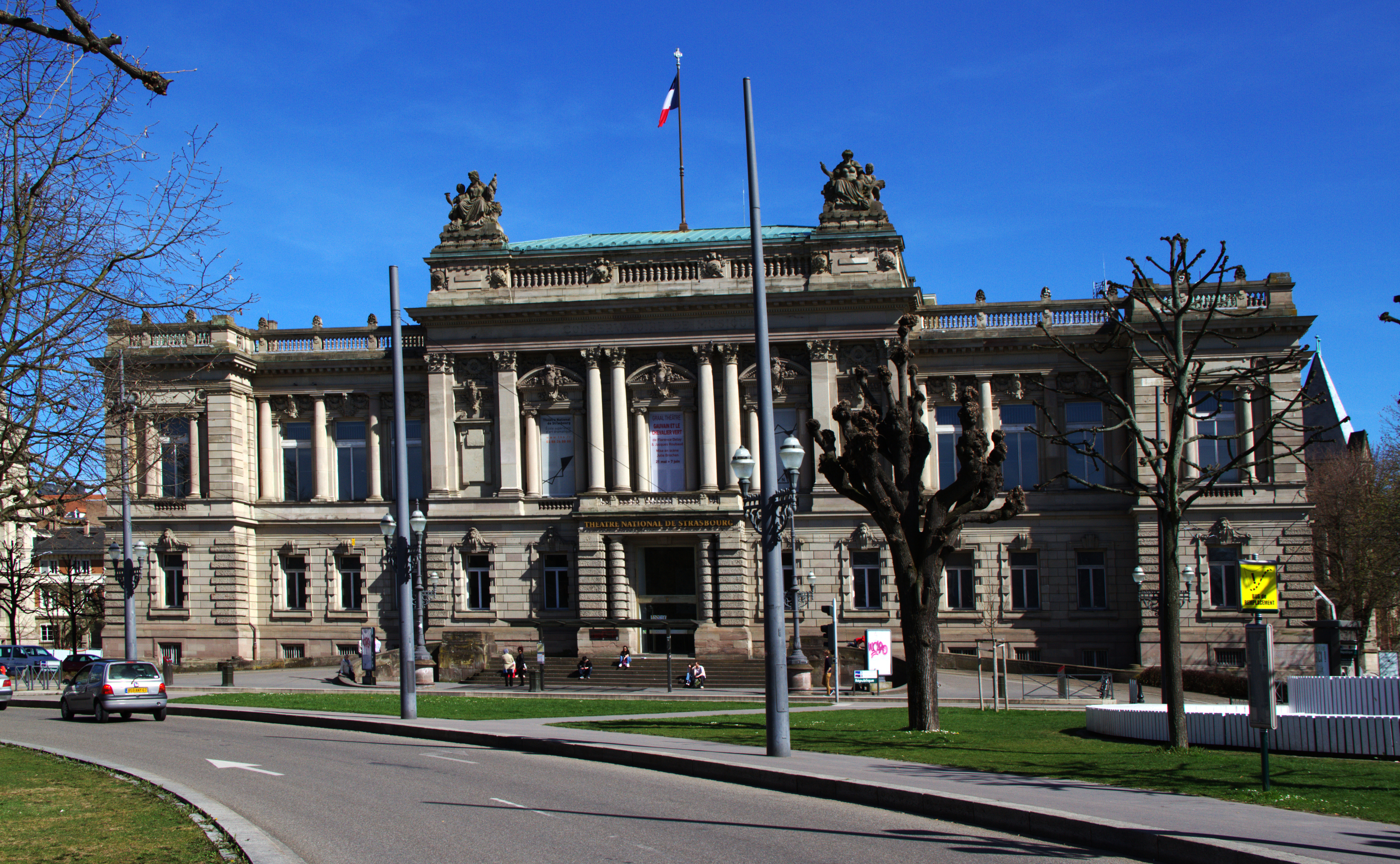 Le palais de la Diète d'Alsace-Lorraine, Landesausschuss, puis Parlement, est construit entre 1888 et 1892 dans un style néoclassique, par les architectes August Hartel et Skjold Neckelman. Édifice majeur du plan d’urbanisme exécuté à Strasbourg pendant l’annexion de l'Alsace-Lorraine il est situé au cœur du quartier impérial allemand, au 7, place de la République.